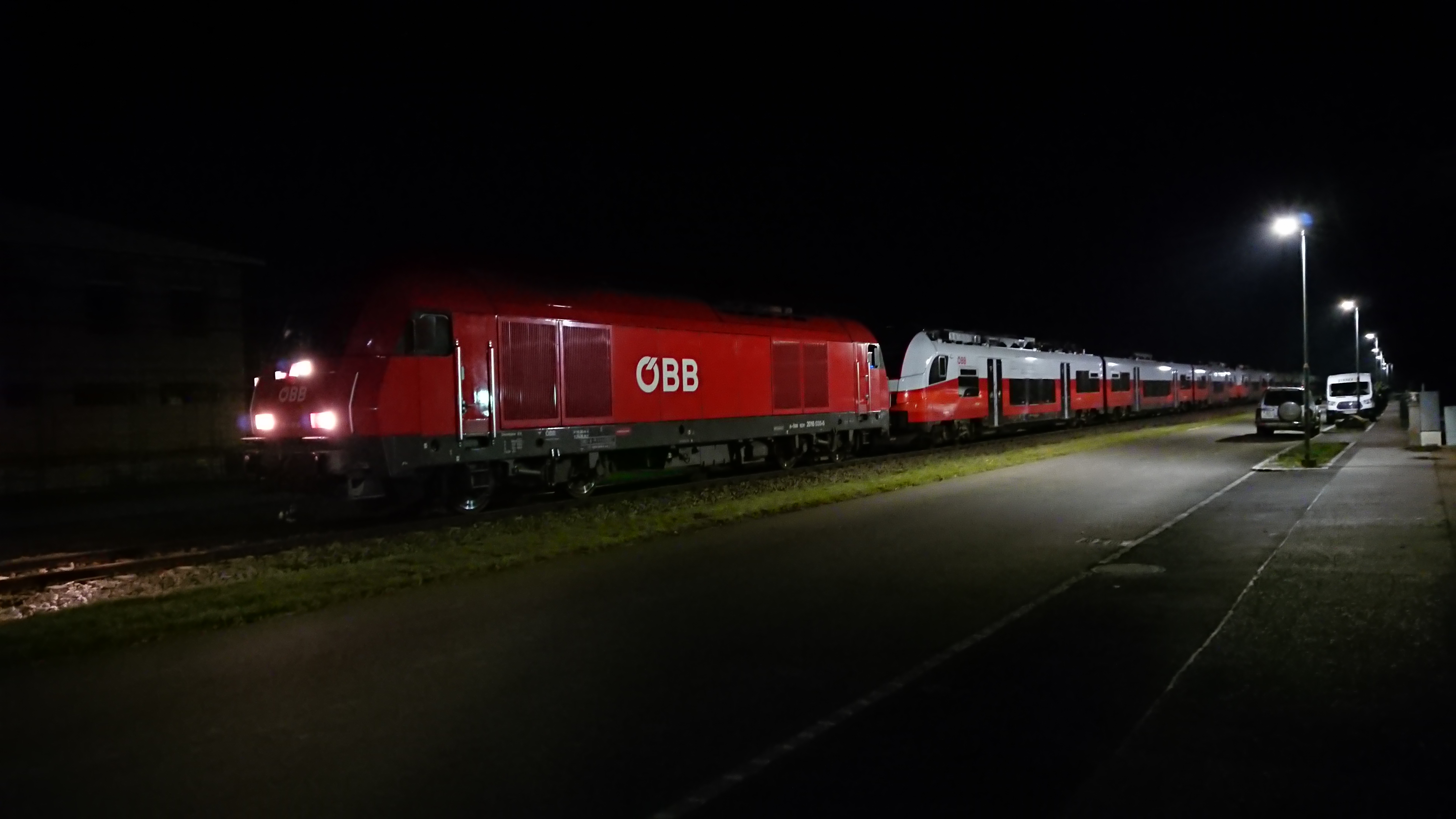 Die ET 4746 011, 013, 017 und 067 werden mittels VL 2016 über die Pulkautalbahn nach Zellerndorf gezogen. Aufgenommen in Alberndorf im Pulkautal am 17.11.2018 um 20:30.